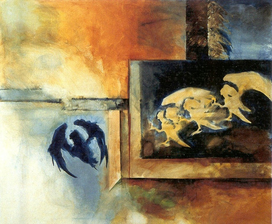 Harpyen, Zyklus FABELWESEN nach J.L.Borges, Moje Menhardt, Acryl, Leinwand 100x120cm